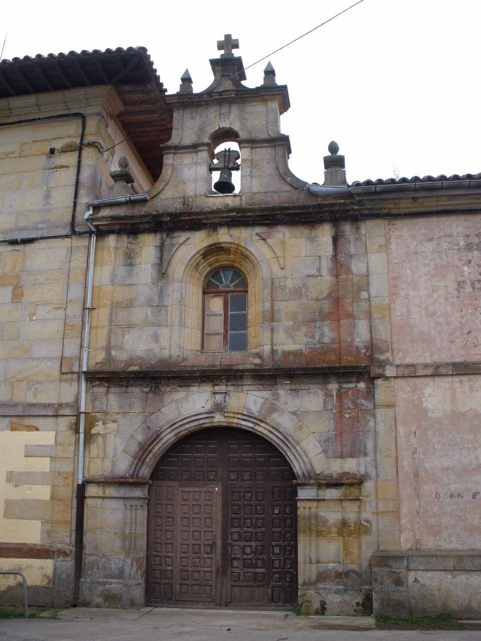 Cóbreces (Cantabria)